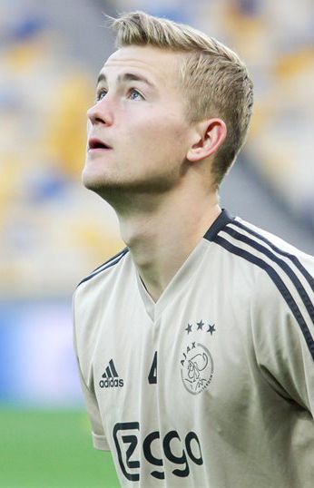 Динамо готовится к матчу против Аякса